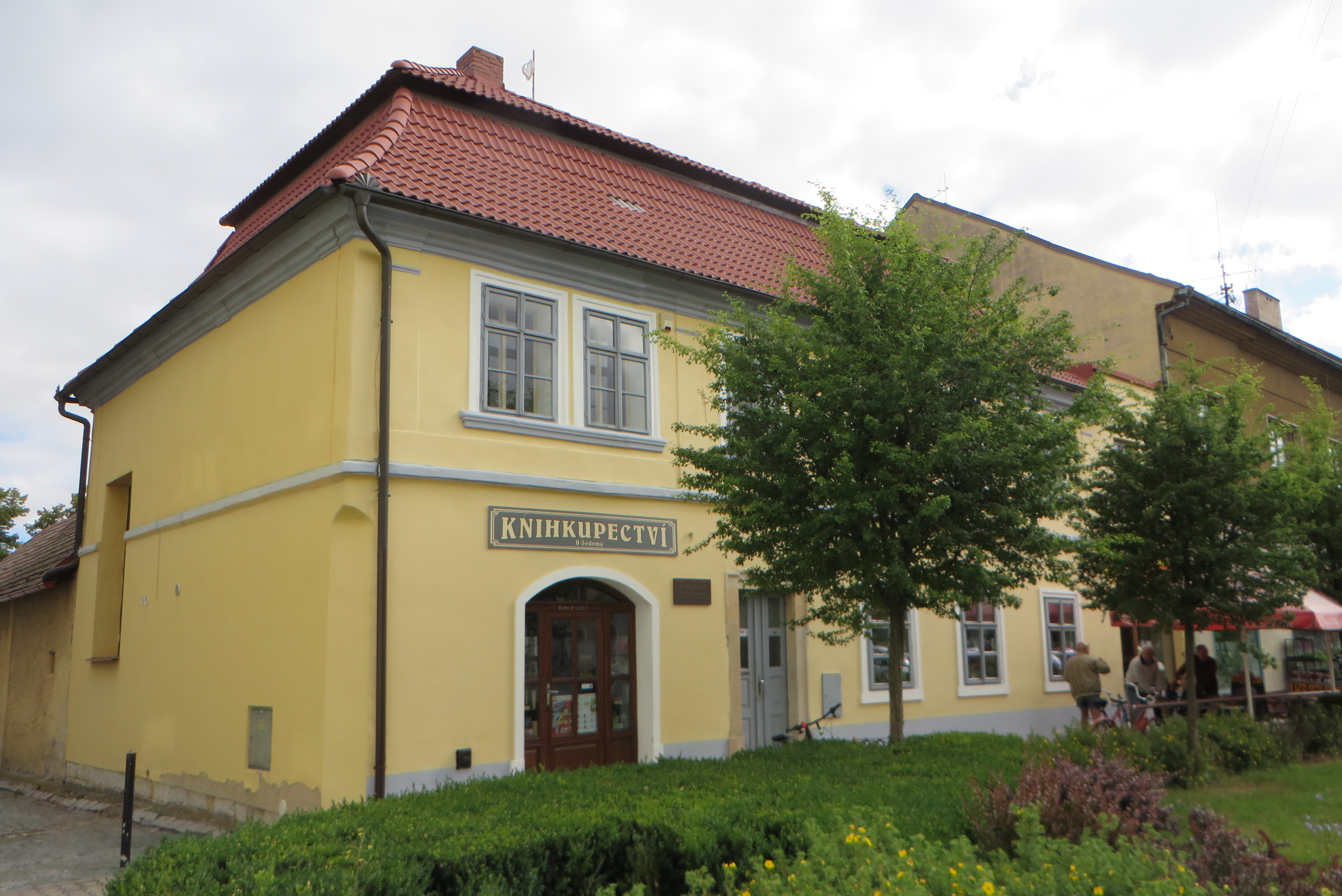 Rodný dům spisovatele Karla Schulze v Městci Králové. Náměstí Republiky č. p. 60.